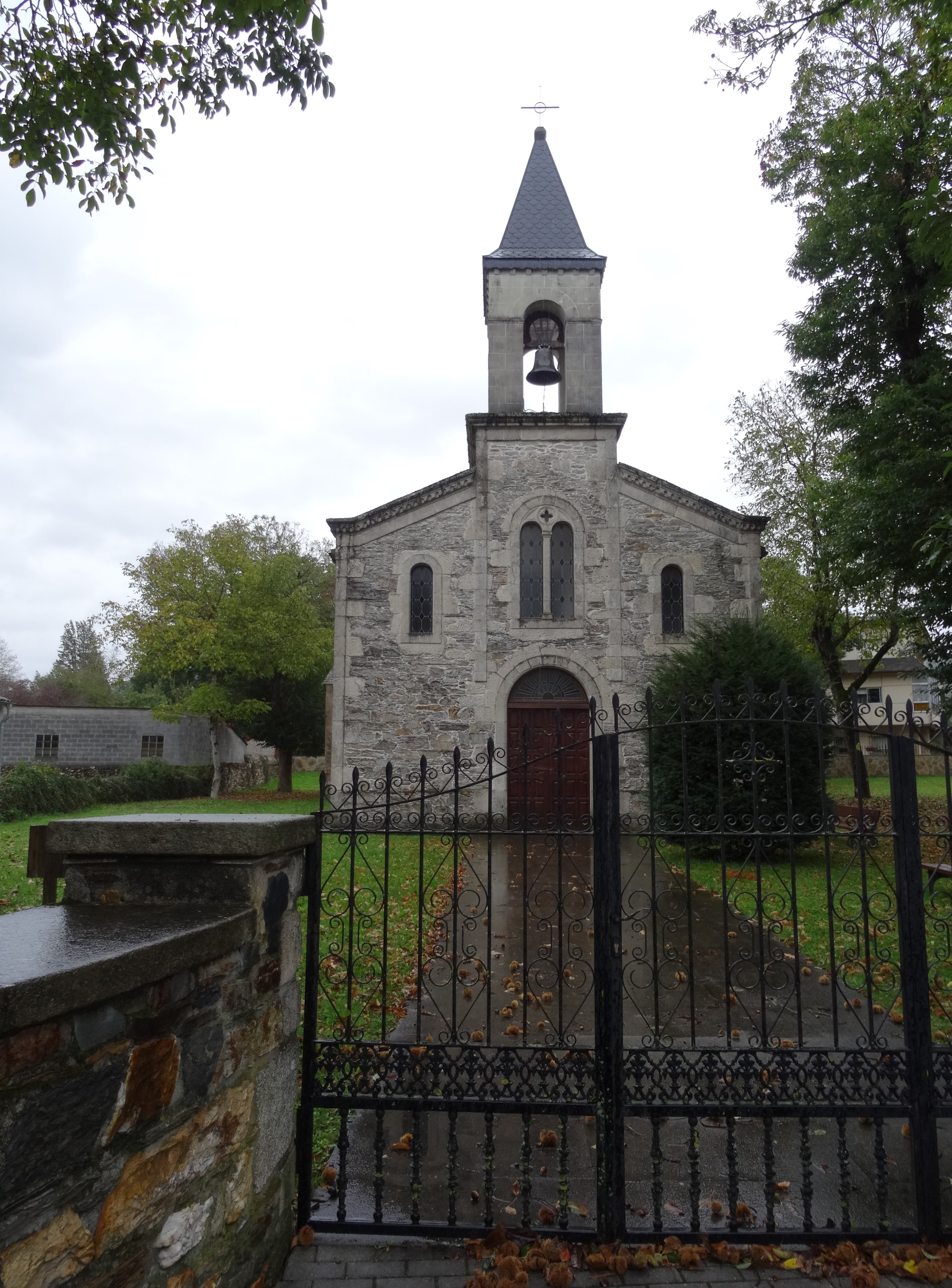 Igrexa de Santa María Madanela de Baralla no concello de Baralla.